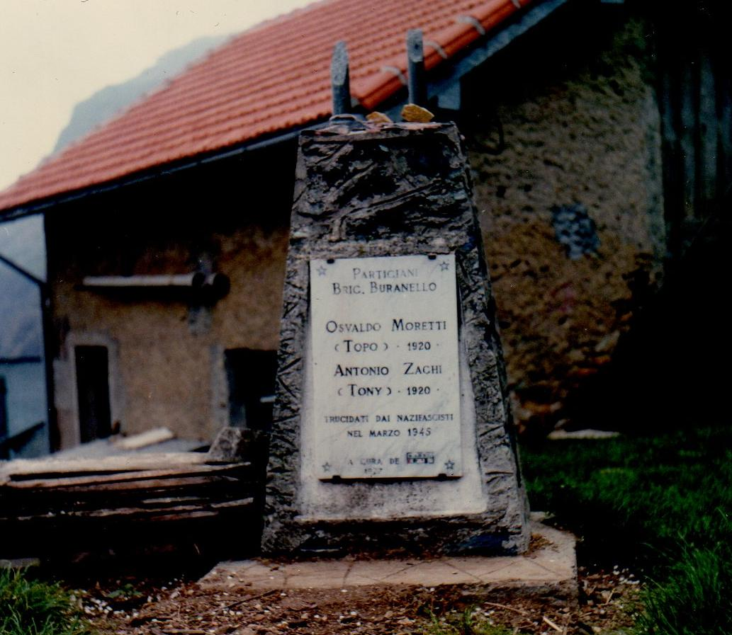 Monumento a due partigiani della brigata Buranello, a Sambuco (frazione di Voltri, Genova)